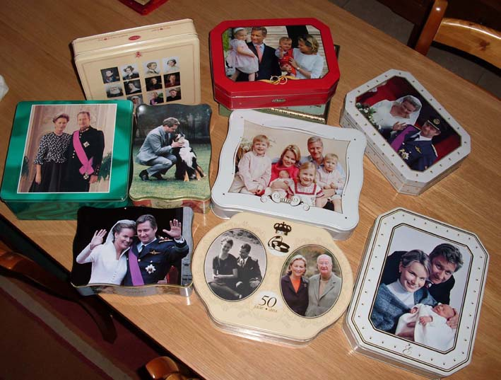 Koektrommels uit België